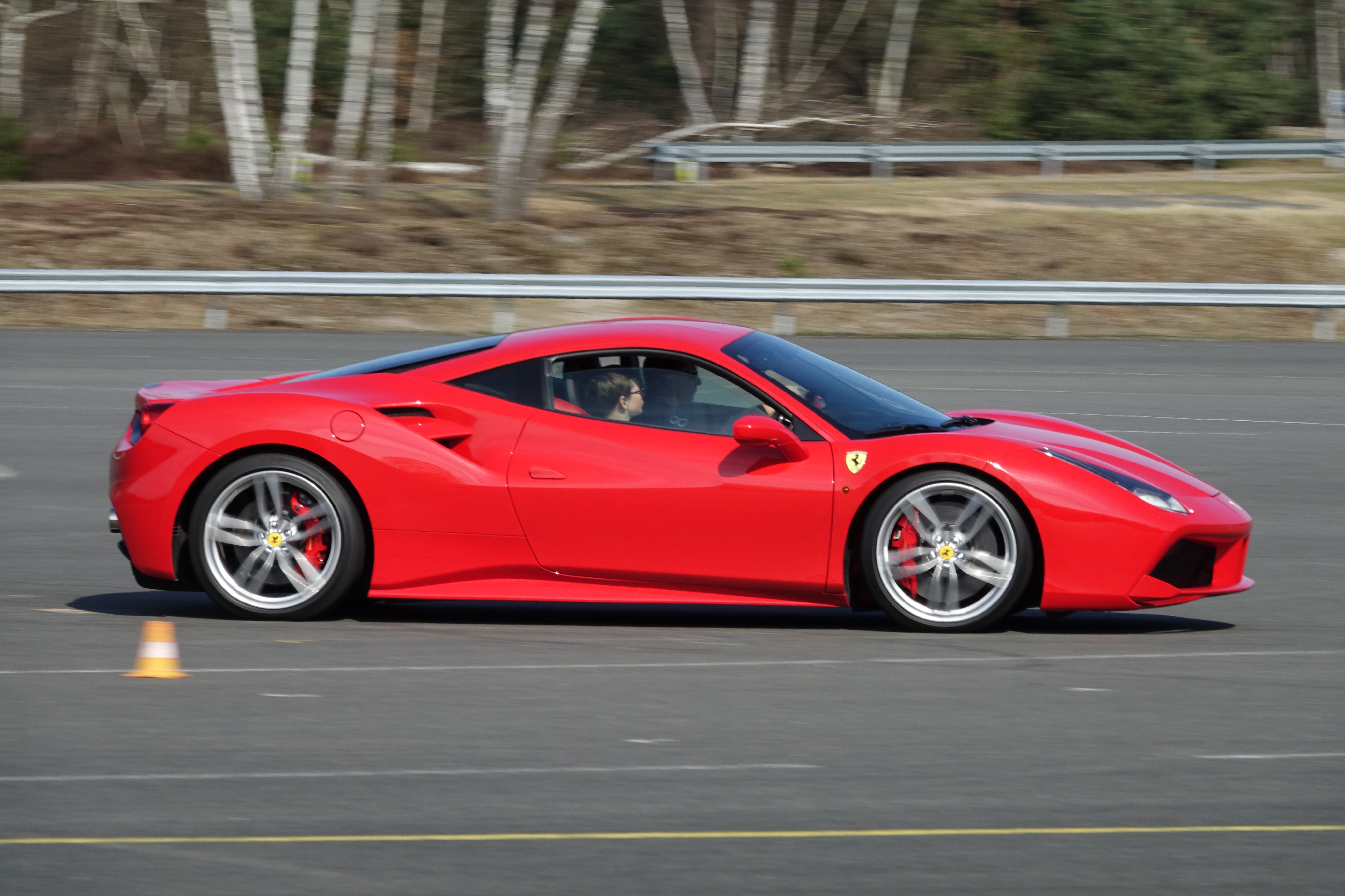 Circuit de Mortefontaine - Tests routier